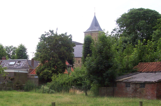 De Toer fan Easterein